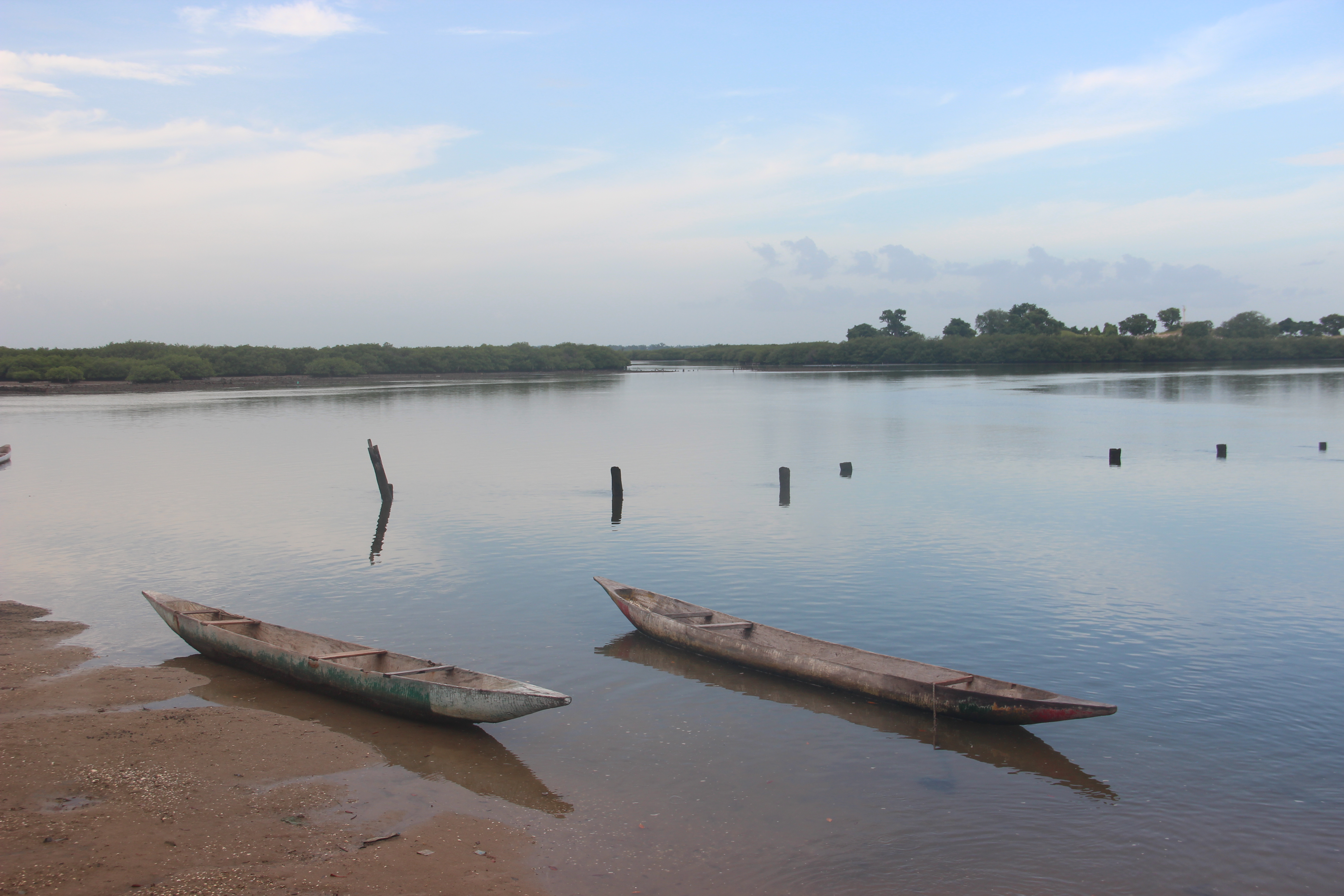 Pirogues à Joal-Fadiouth. This is an image with the theme "Africa on the Move or Transport" from: Senegal